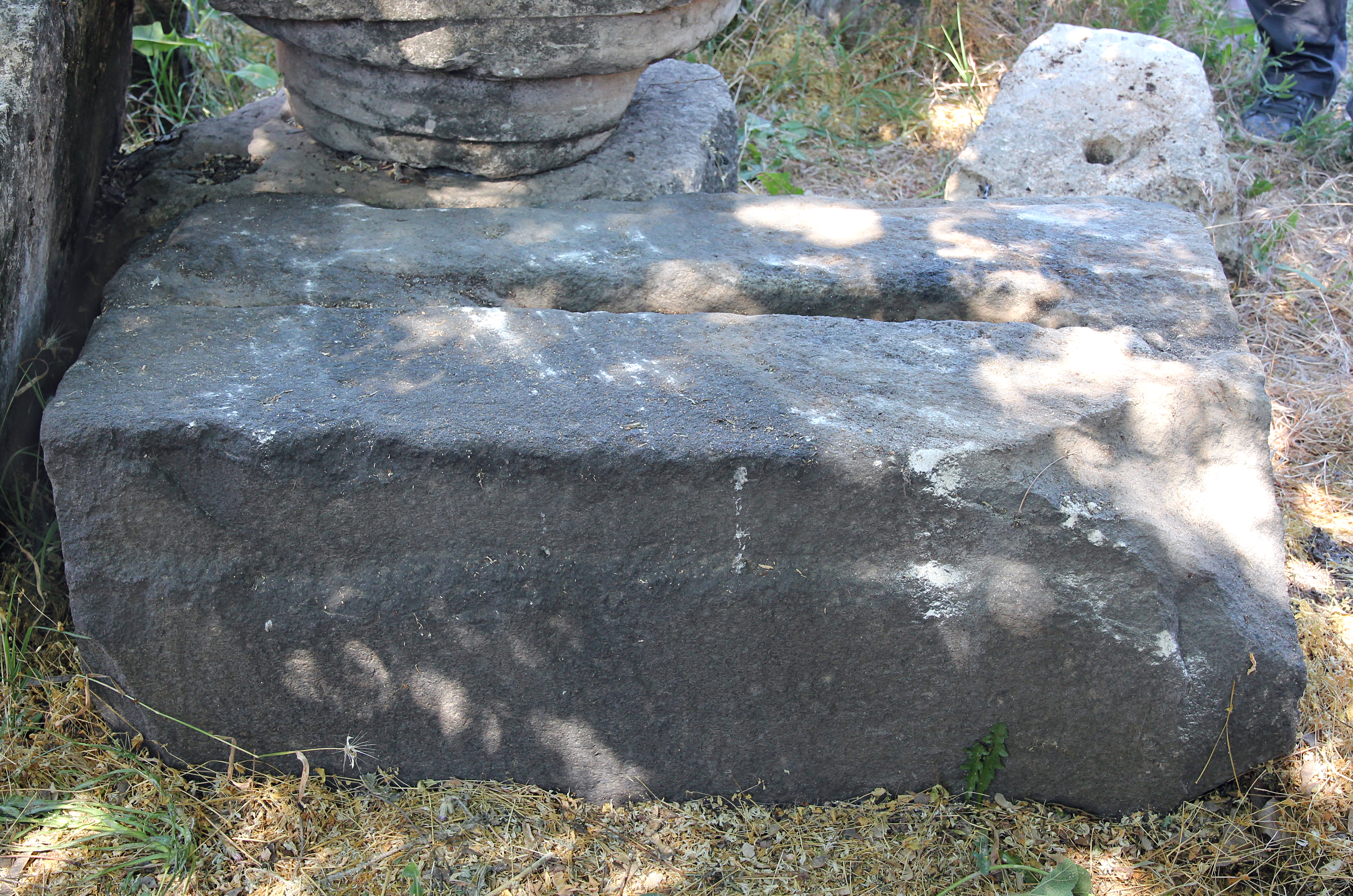 Späthethitische Stele Samsat 1 im Archäologischen Museum Adıyaman